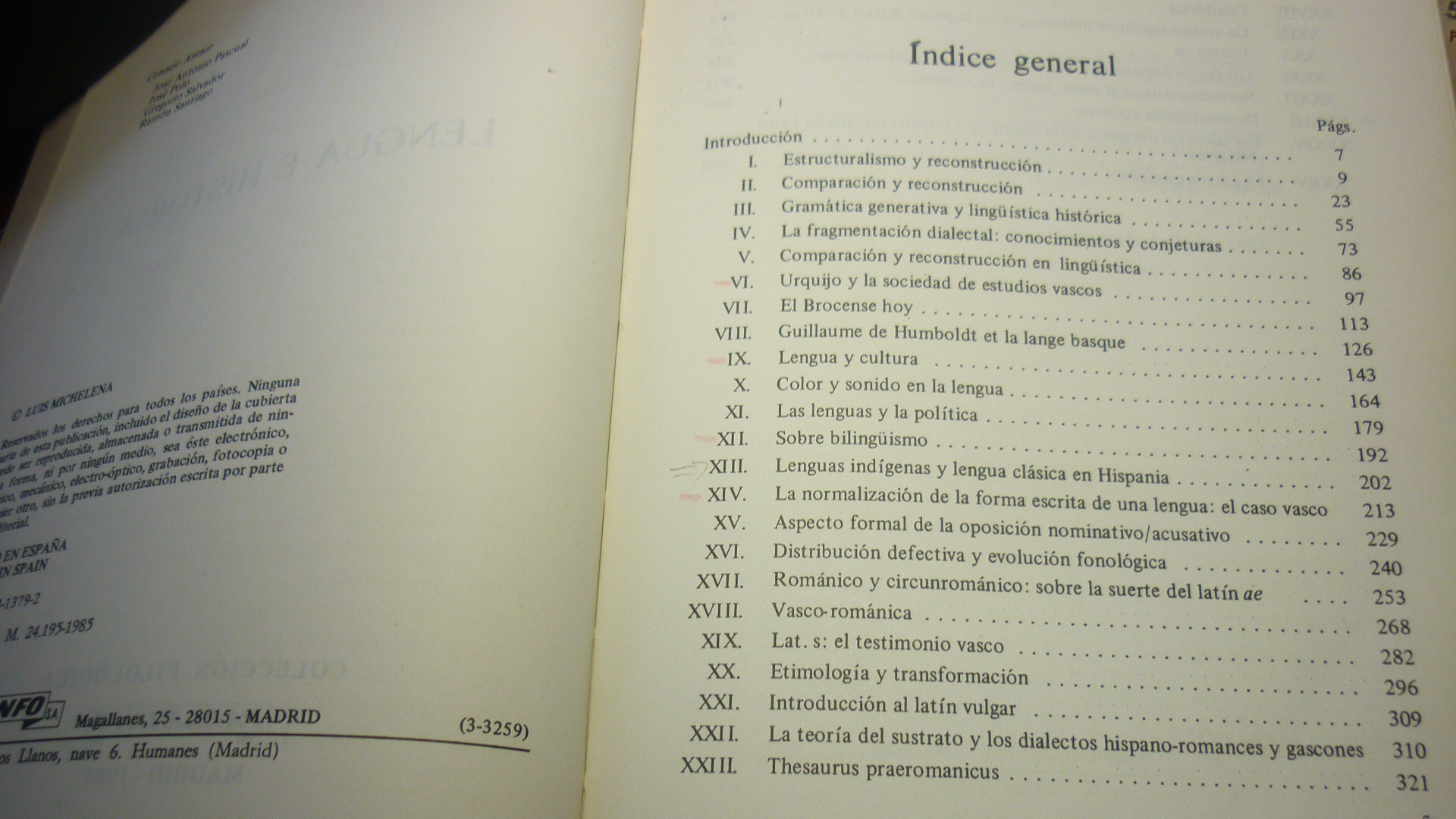 Koldo Mitxelena - Lengua e historia. Paraninfo. Madril. 1985. Liburuaren aurkibidearen lehen orrialdea.